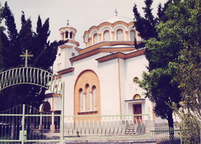 Църквата "Света Богородица" в Тополовград